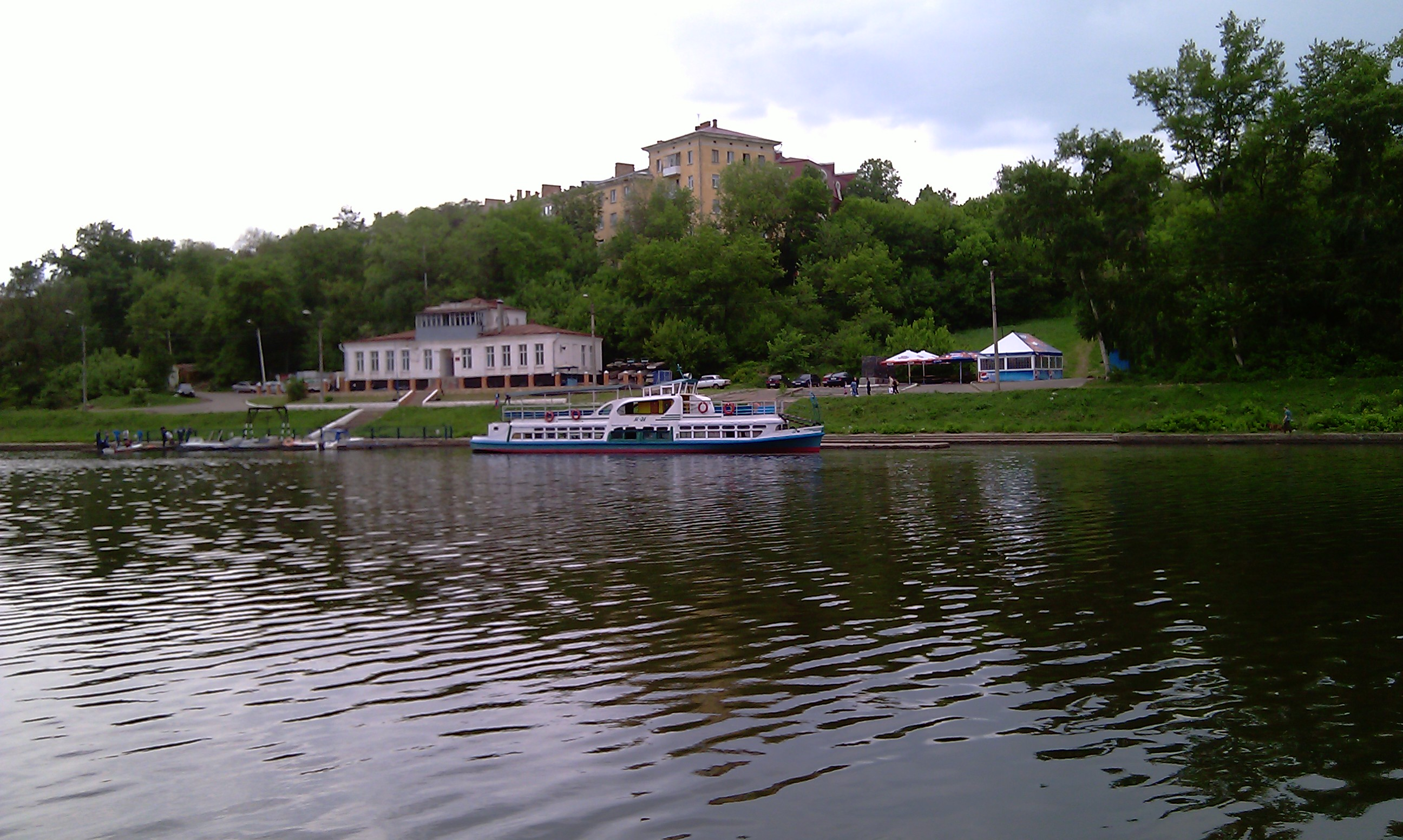 Спасательная станция вид с набережной (рядом со "стрелкой")